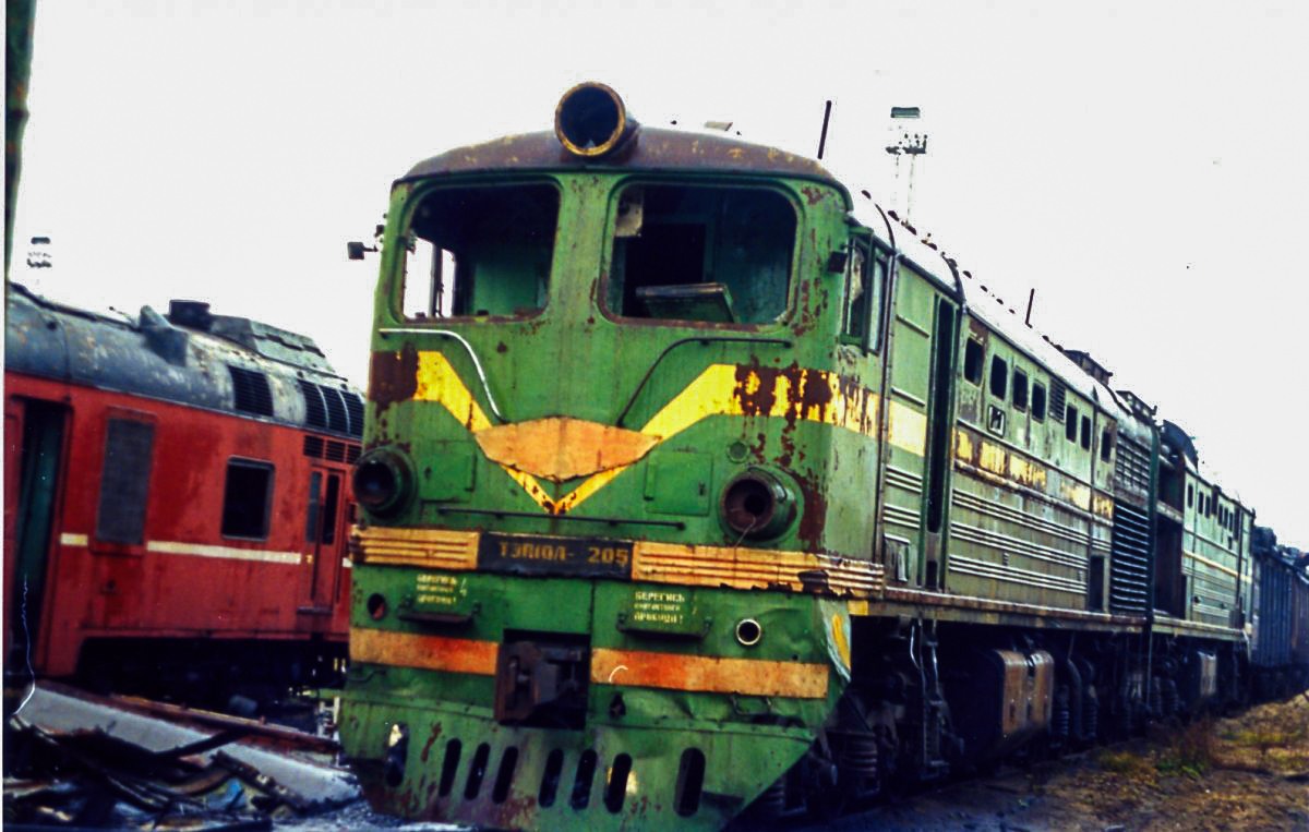 Тепловоз ТЭП10Л-042 (перенумерованный в 205) в депо Узловая. Слева виден дизель-поезд Д1